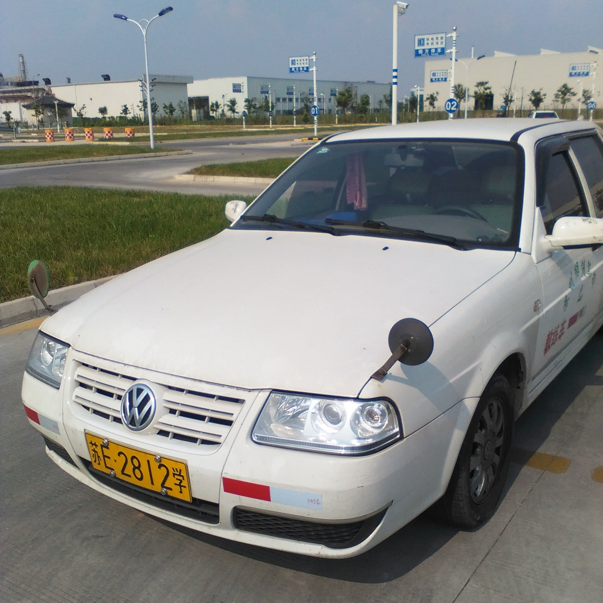 中文（中国大陆）: 一辆桑塔纳志俊教练车